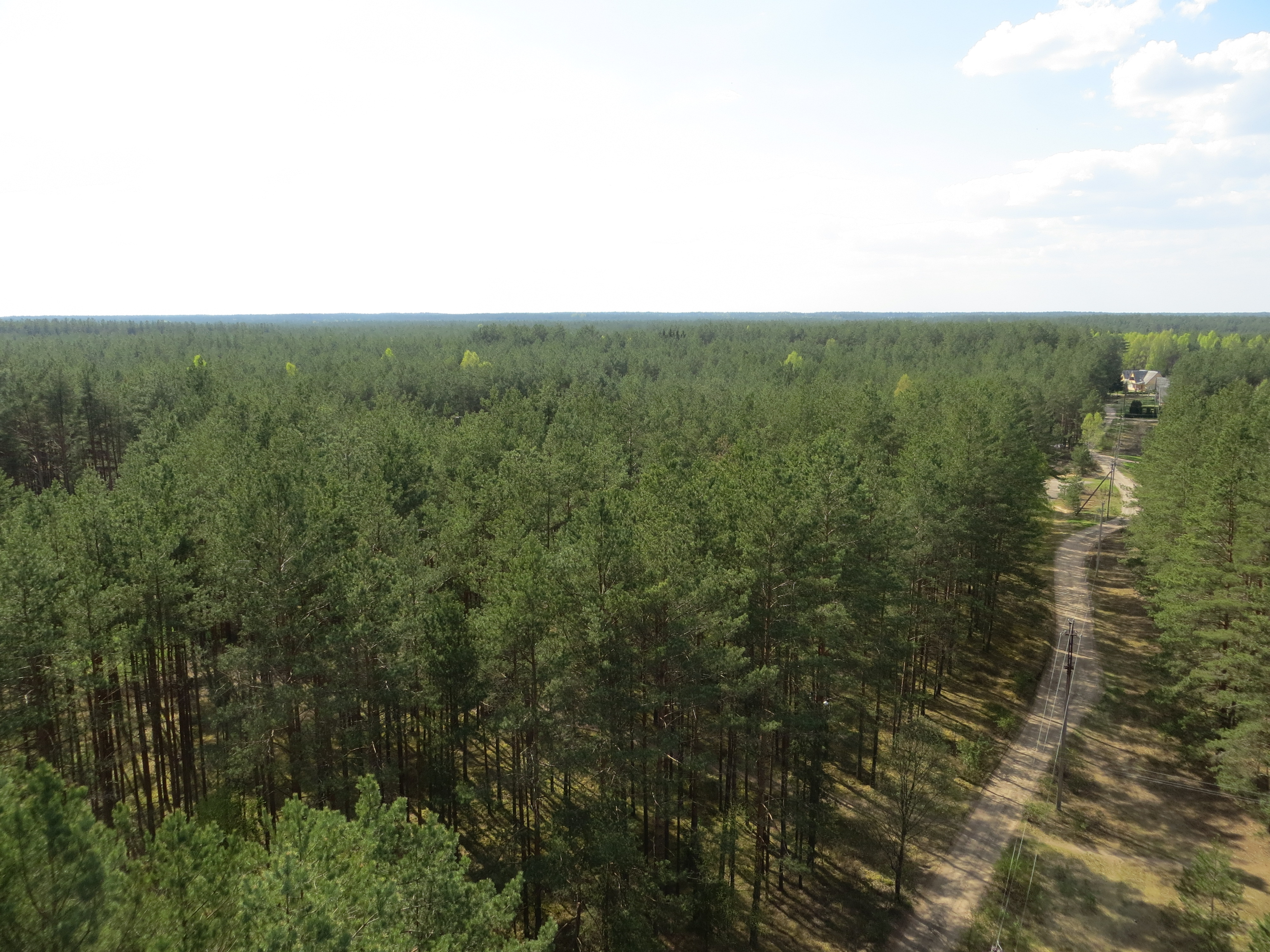 Platumai 18208, Lithuania